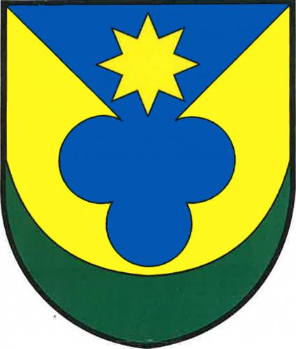 Libež znak